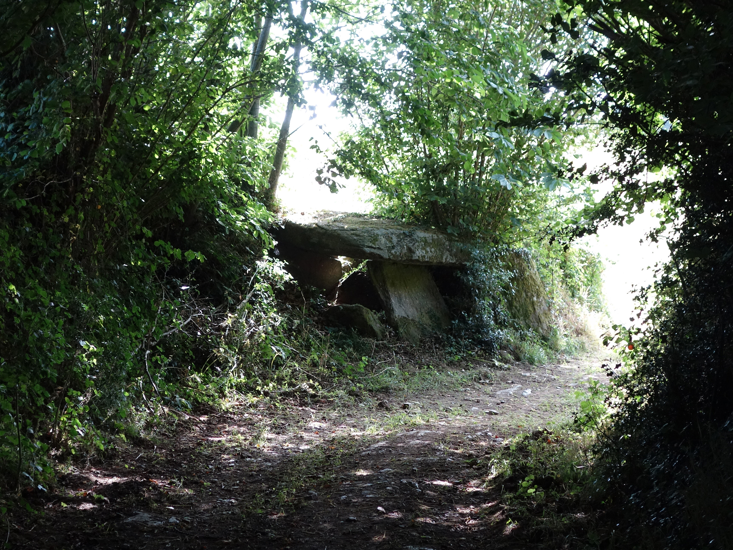 Près de Bannalec, près d'une grosse ferme, au bout d'un chemin ombragé, voici l'allée couverte de Kermaout…